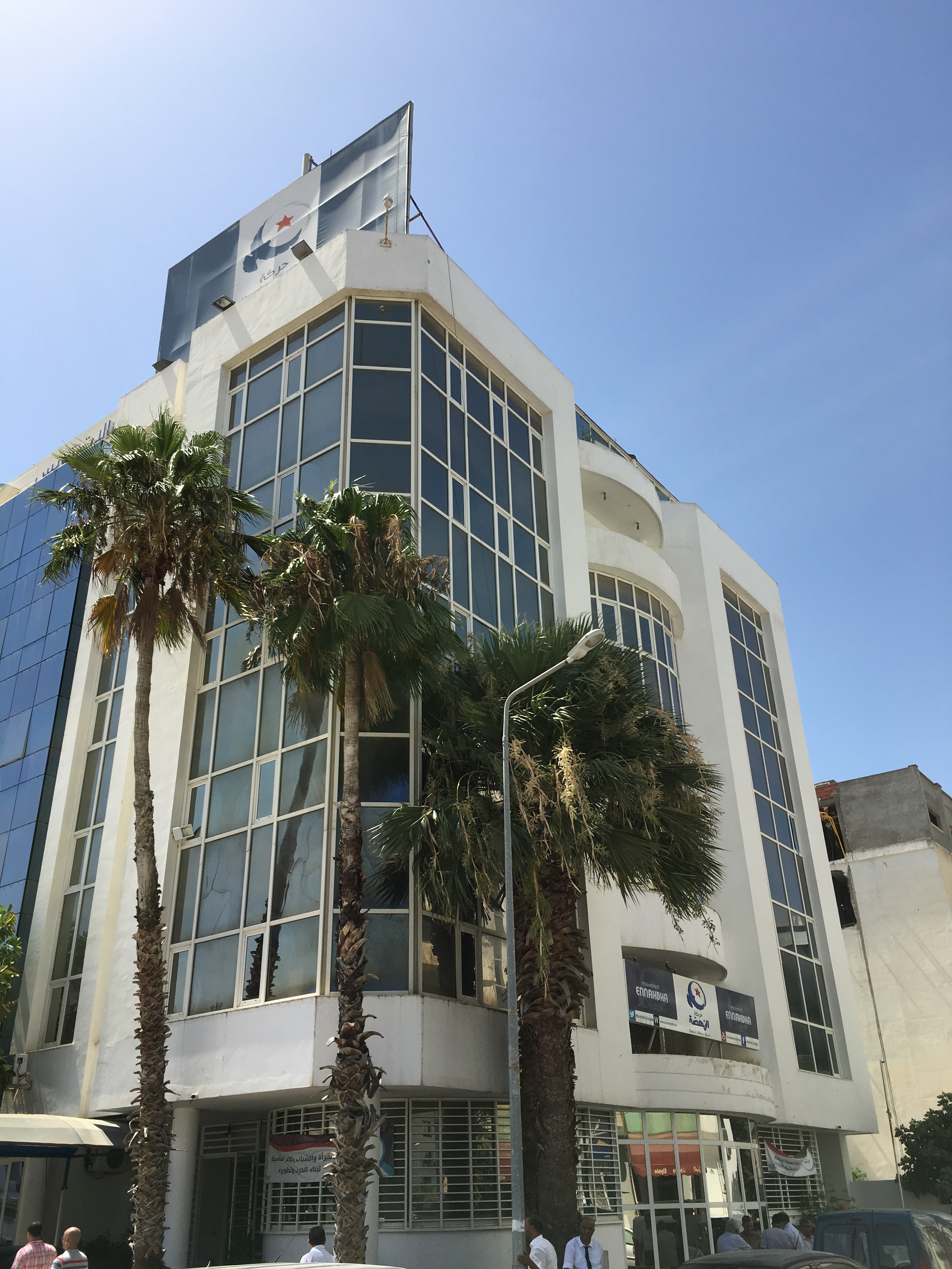 Siège du Mouvement Ennahdha à Tunis, juillet 2019.